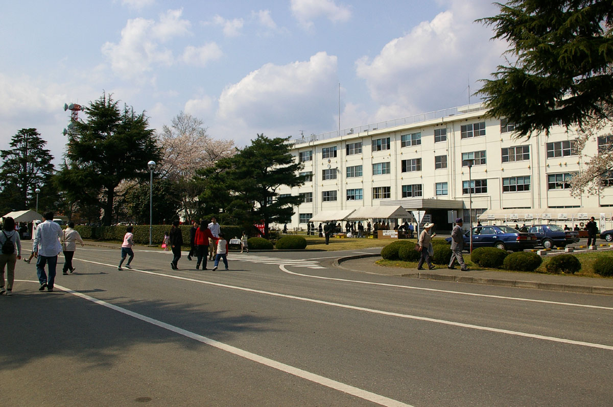 Taken by los688,8-Apr-2007,JGSDF Camp-Utsunomiya.PD-self. ja:2007年4月8日、投稿者撮影。陸上自衛隊宇都宮駐屯地創立57周年記念行事。宇都宮駐屯地の風景。